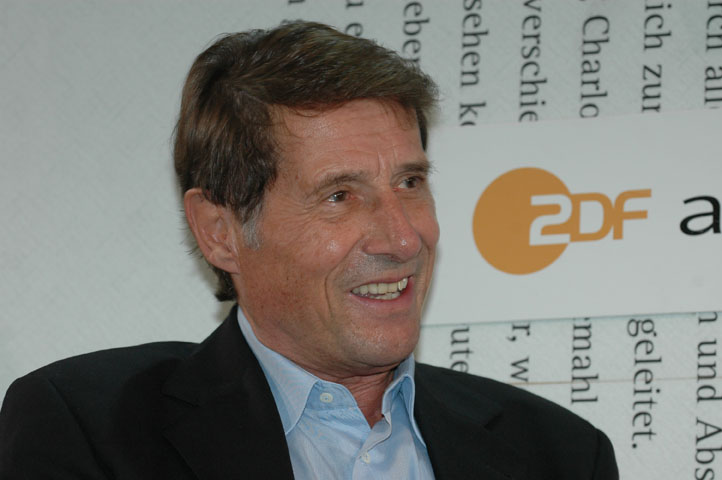 Udo Jürgens. Dieses Fotos dürfen Sie honorarfrei nutzen, wenn Sie folgenden credit beachten: Copyright: Das blaue Sofa / Club Bertelsmann.